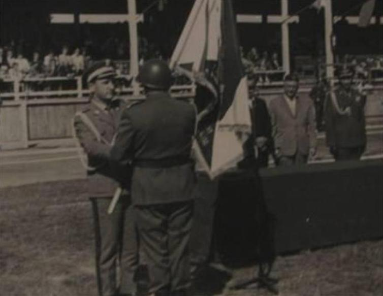 Garnizon Przasnysz. Uroczystość nadania sztandaru ufundowanego przez społeczeństwo Przasnysza dla 2 Ośrodka Radioelektronicznego ( JW 4420). Sztandar wręczył gen. bryg. Władysław Oliwa dla dowódcy płk Zbigniewa Mroza. Jednocześnie jednostka przyjęła imię kan. Michała Okurzałego